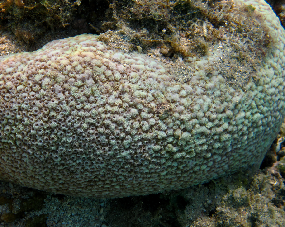 Une colonie de corail Astrea curta à la Réunion.